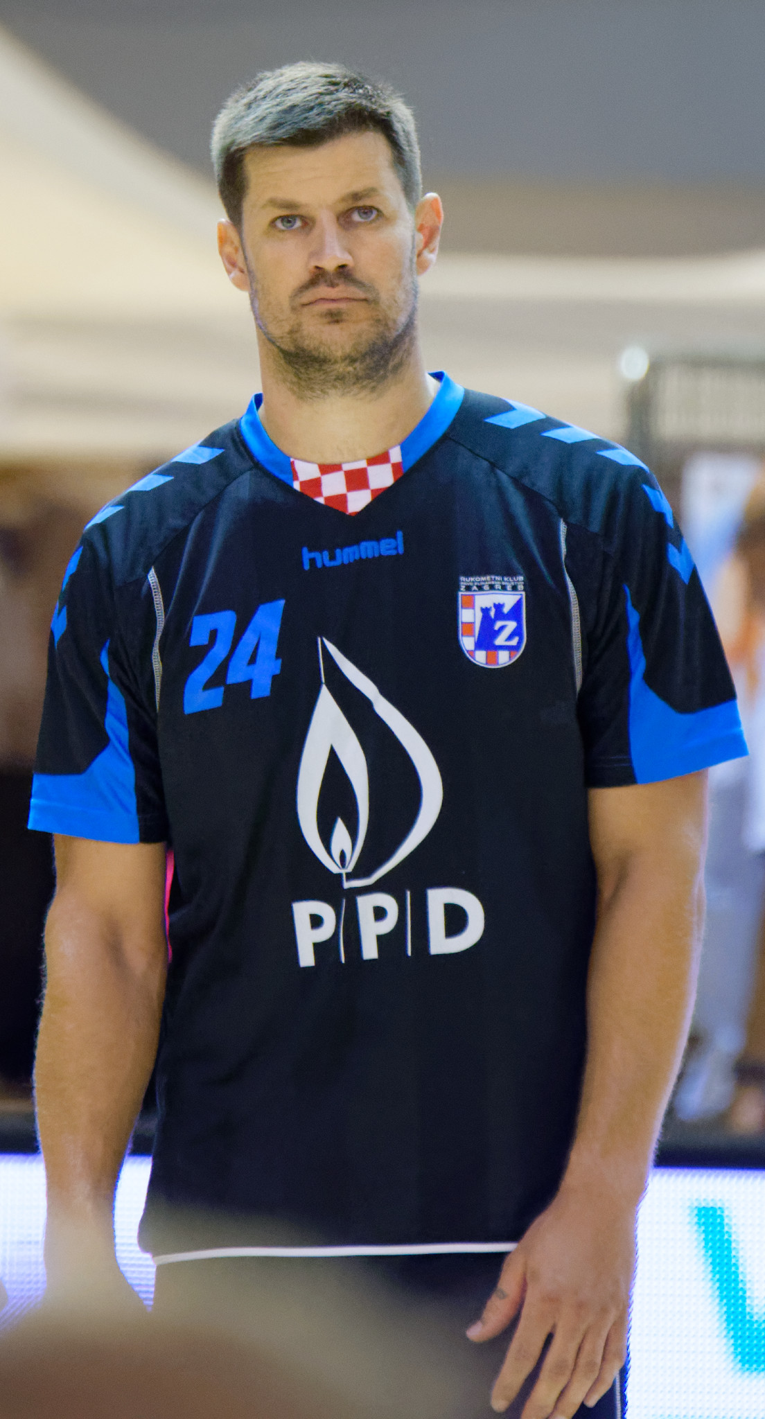 Rencontre du challenge Marrane 2016 entre l'US Dunkerque et les croates du RK Zagreb